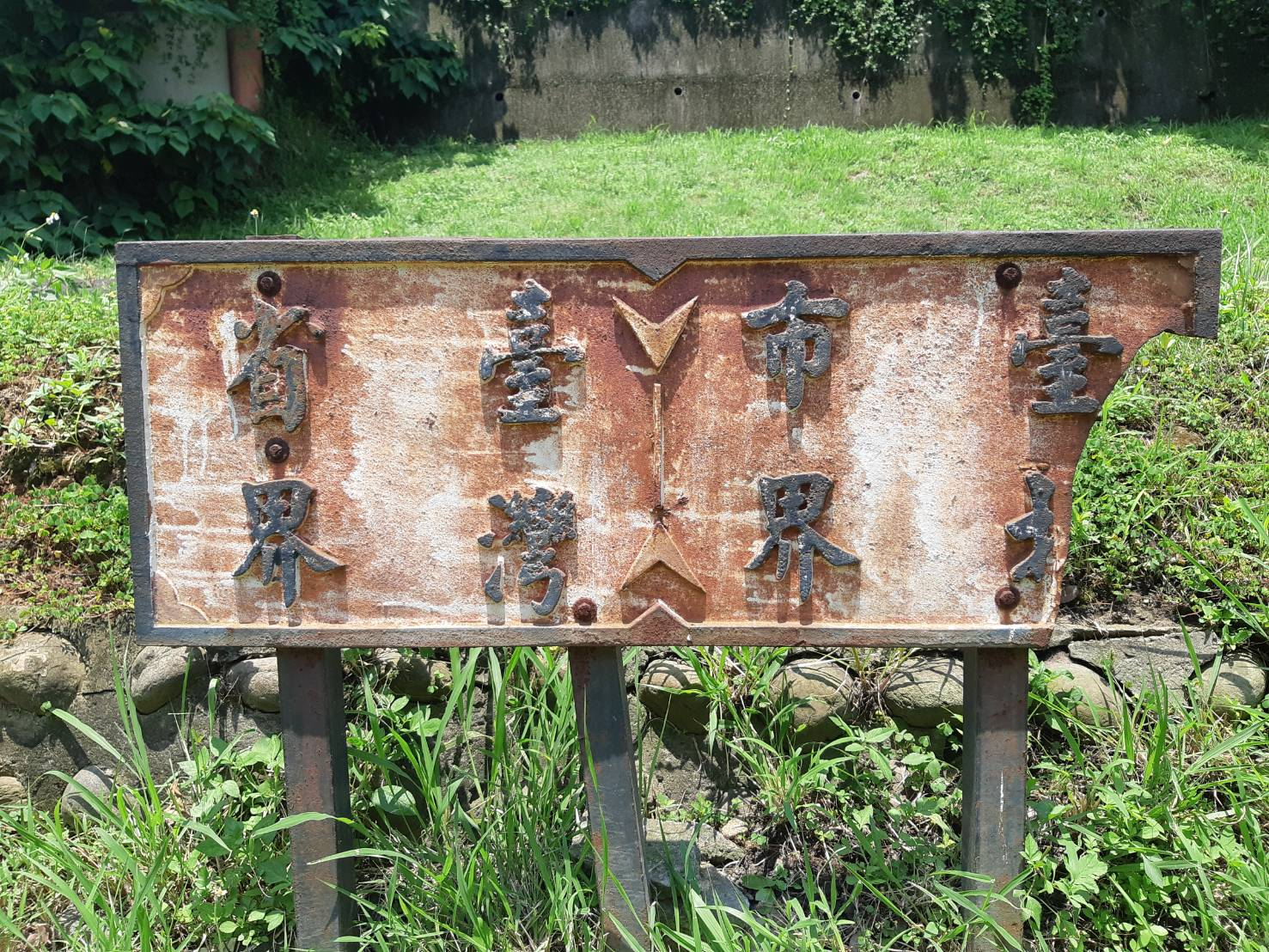 位於關渡與竹圍交界的臺灣省與臺北市(直轄市)交界告示牌，推測於台灣省虛級化前設置。